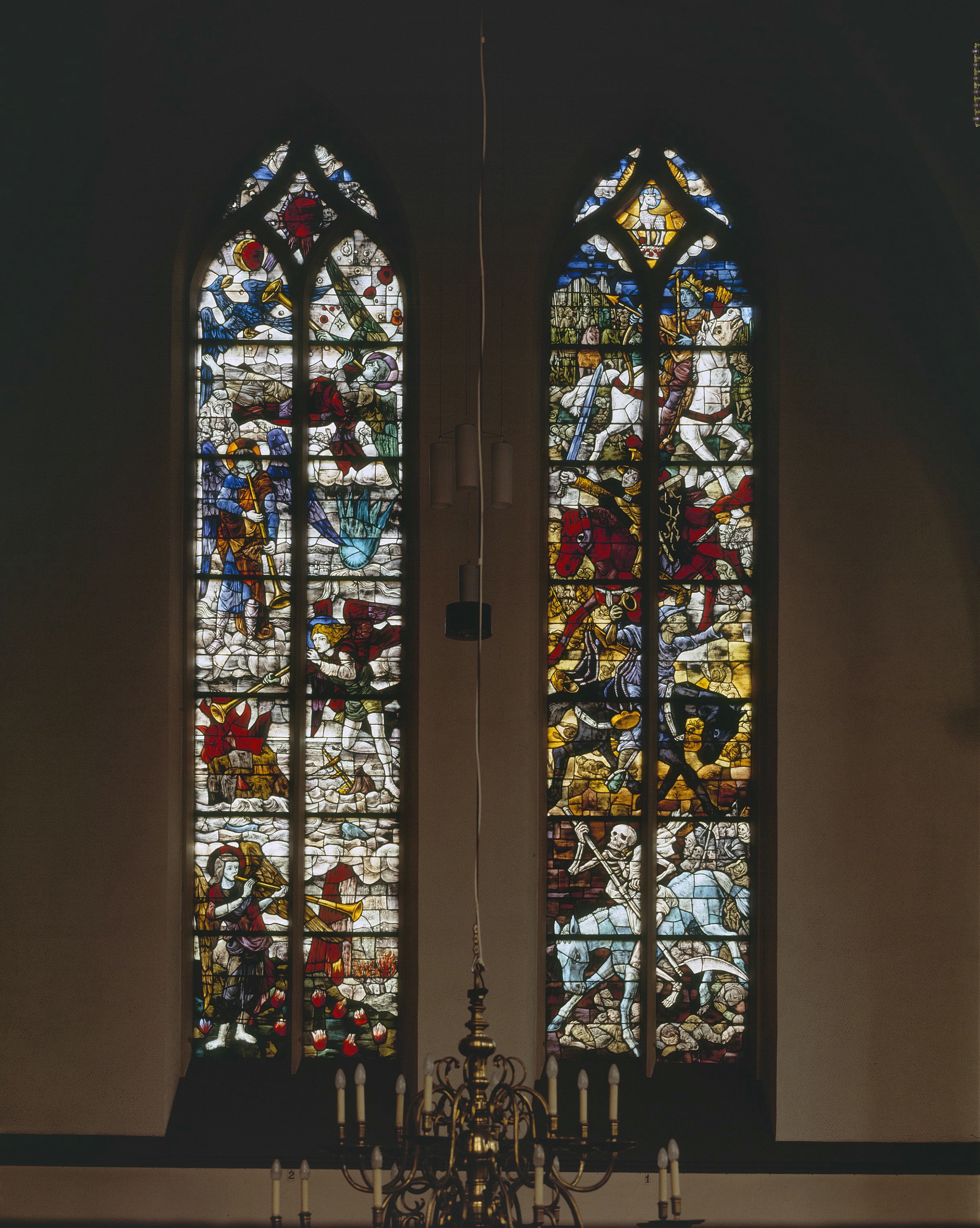 Rooms-katholieke Sint-Pancratiuskerk: Interieur, aanzicht gebrandschilderd en geëtste glas-in-loodramen (opmerking: Gefotografeerd voor Glas in lood in Nederland 1817-1968)